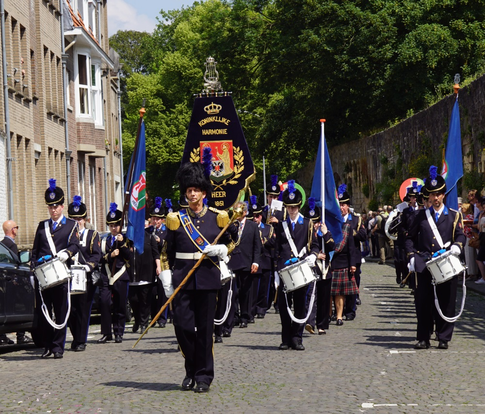 Heiligdomsvaart Maastricht, 2e Ommegang. Koninklijke Harmonie Heer 1851 Maastricht.